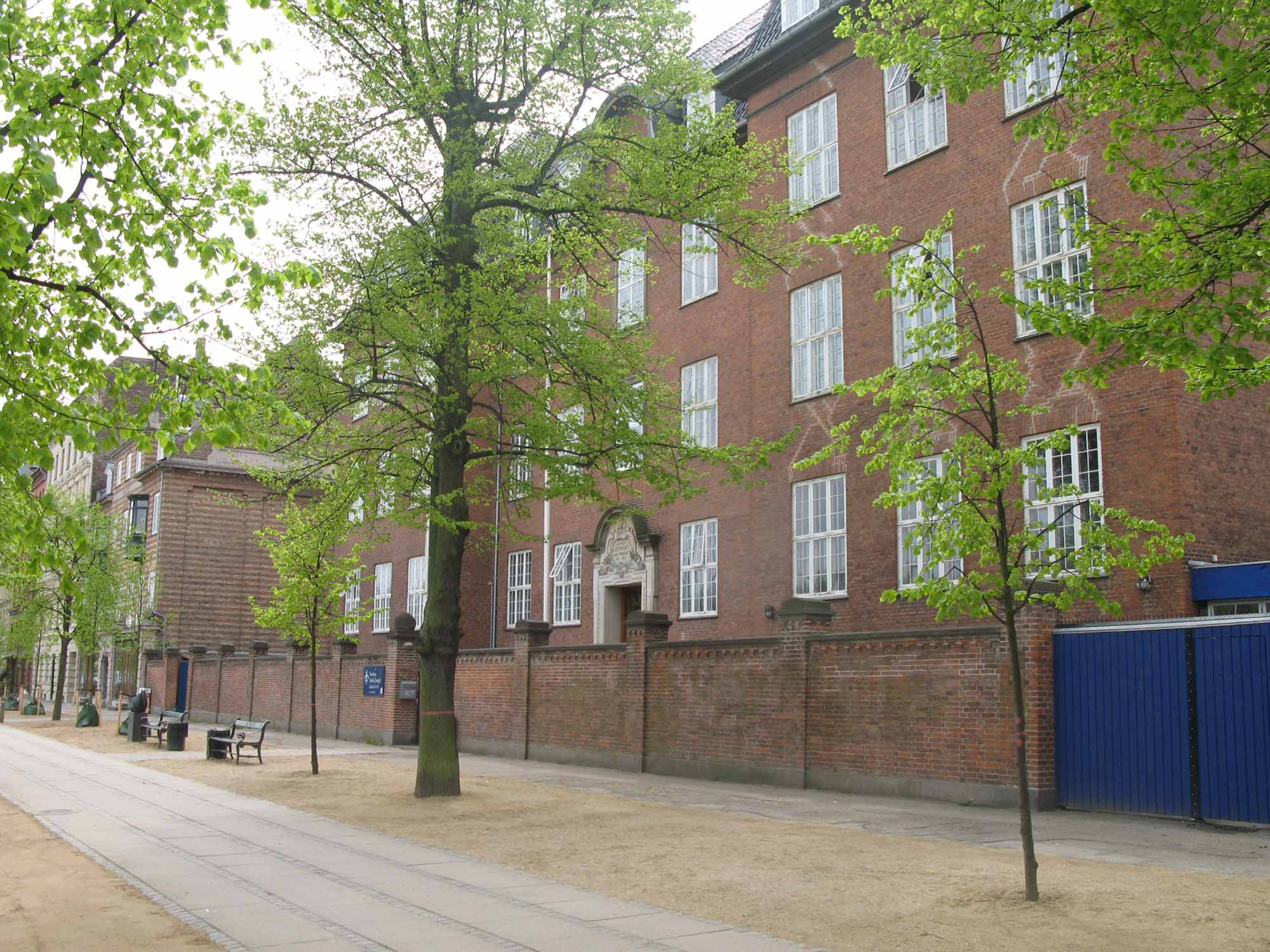 Foto taget af Institut Sankt Joseph